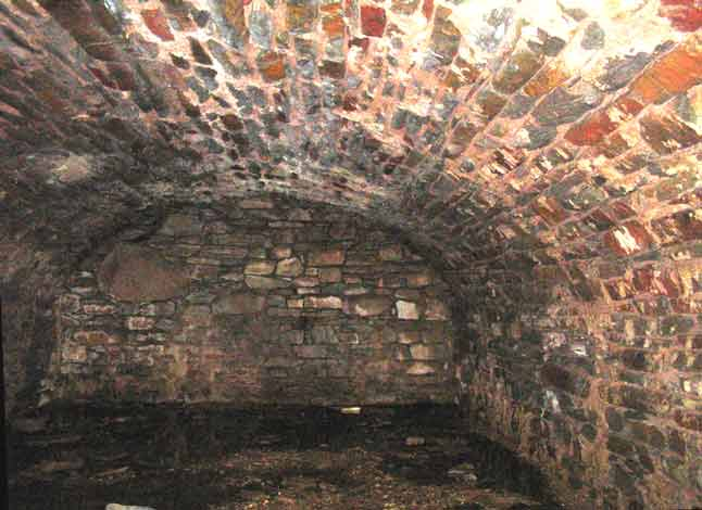 Tannerie Kalpers (Malmedy) : cave voûtée.